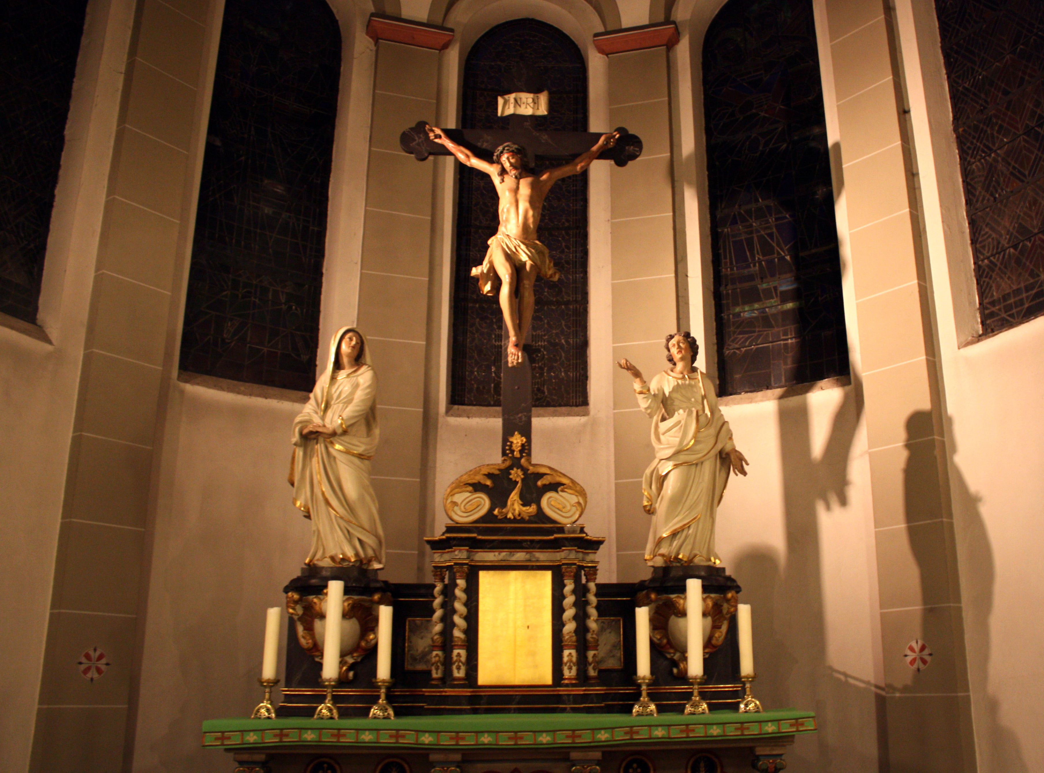 Alt-Hürth, St. Katharina. Altar und barocke Kreuzigungsgruppe. Letztere enstammt der ehemaligen Klosterkapelle Marienborn, Burbach